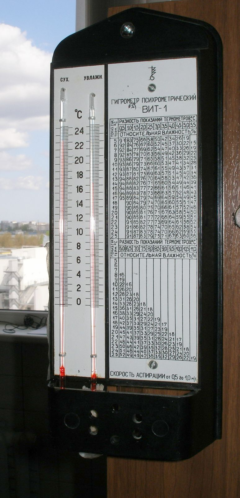 Vienkāršs stacijas psihrometrs ВИТ-1.